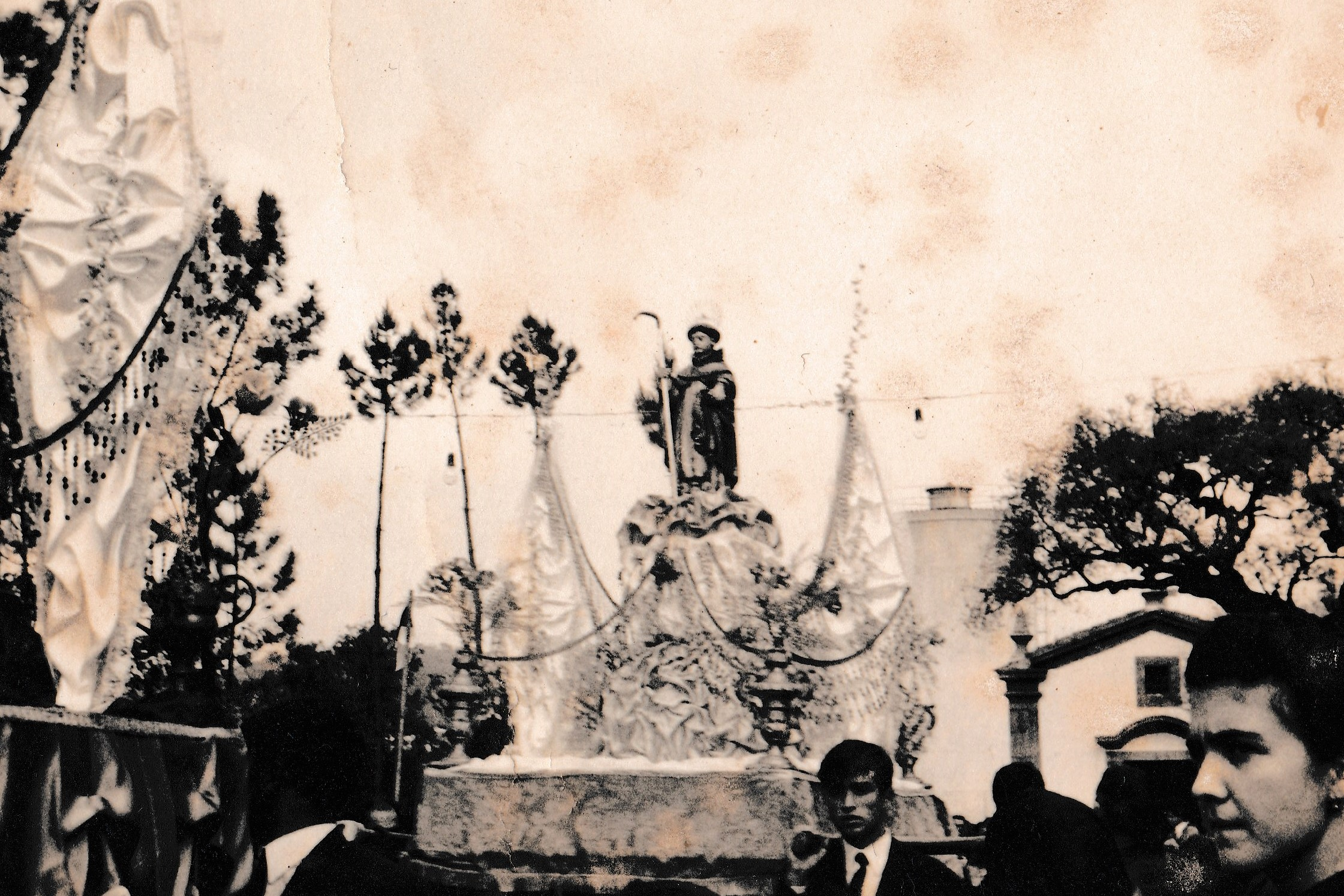 Festa de S. Gonçalo (Foto de Florinda Fernandes, anos 40)